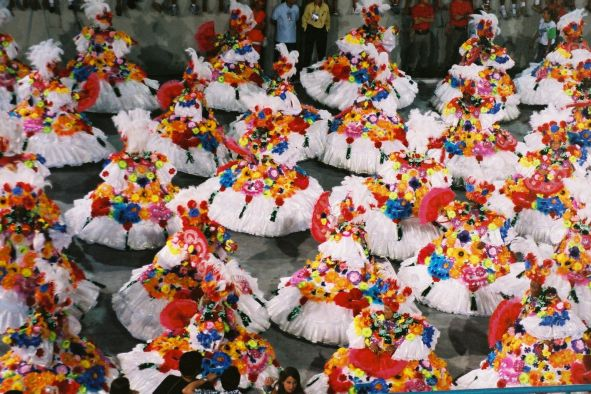 Défilé des écoles du groupe spécial au sambodrome lors du carnaval de Rio 2004 L'aile des Bahianaises de l'école Imperatriz Photographie prise par utilisateur:Clem Cousi Utilisateur:Clem Cousi